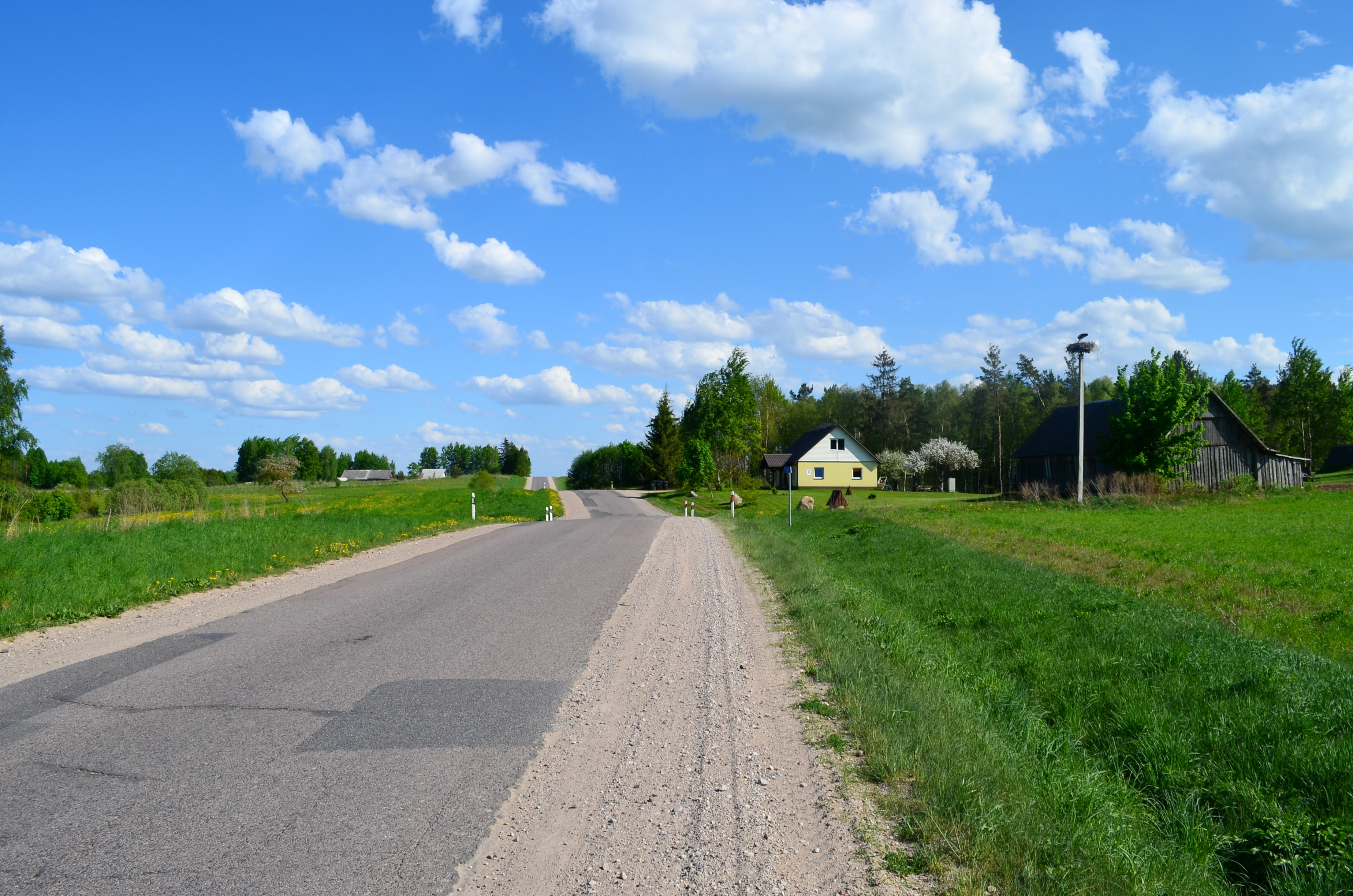 Andrašiūnai, Inturkės sen., Molėtų raj.